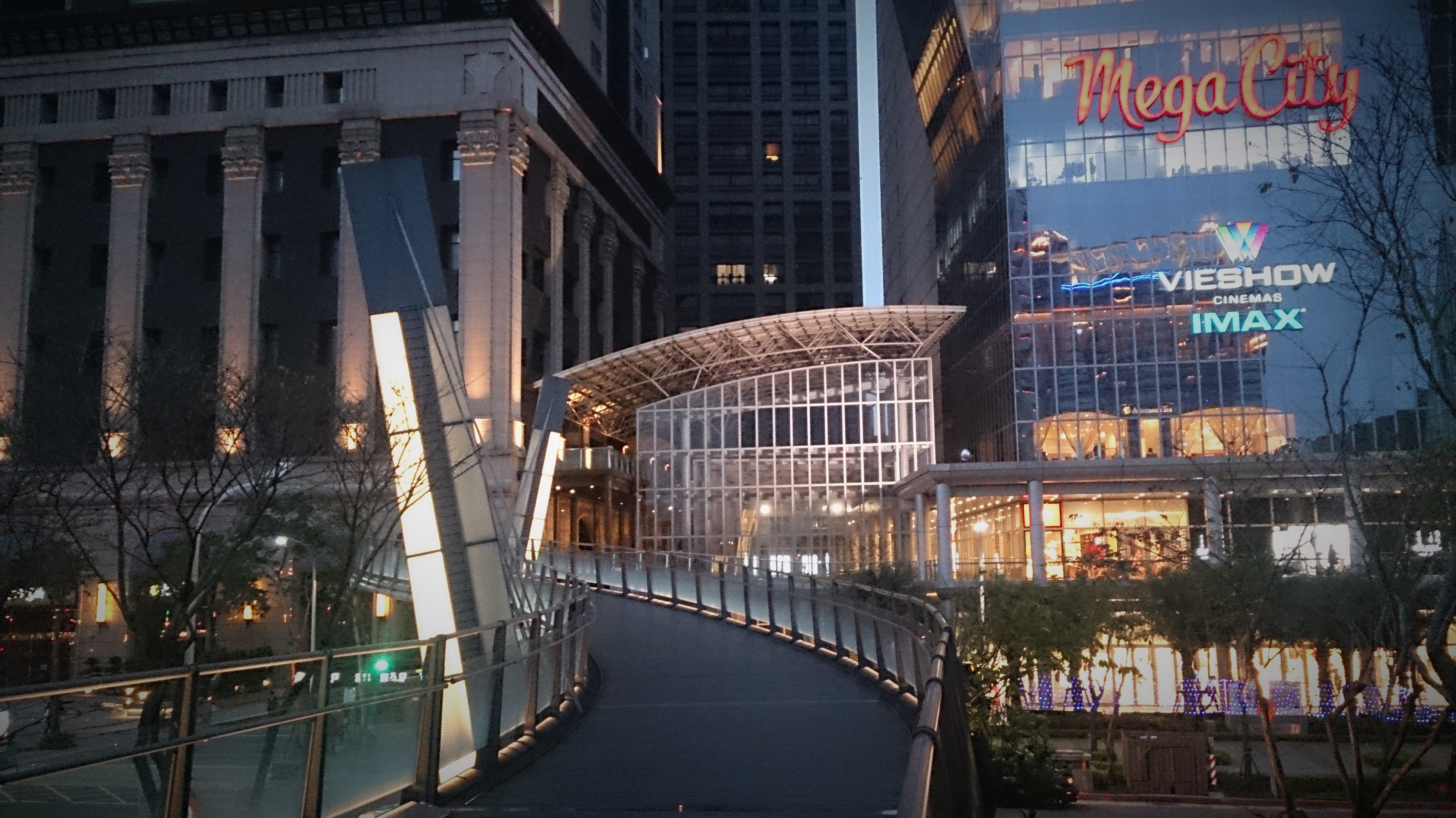 中文（台灣）: 新板特區連接購物中心與市民廣場的空中走廊